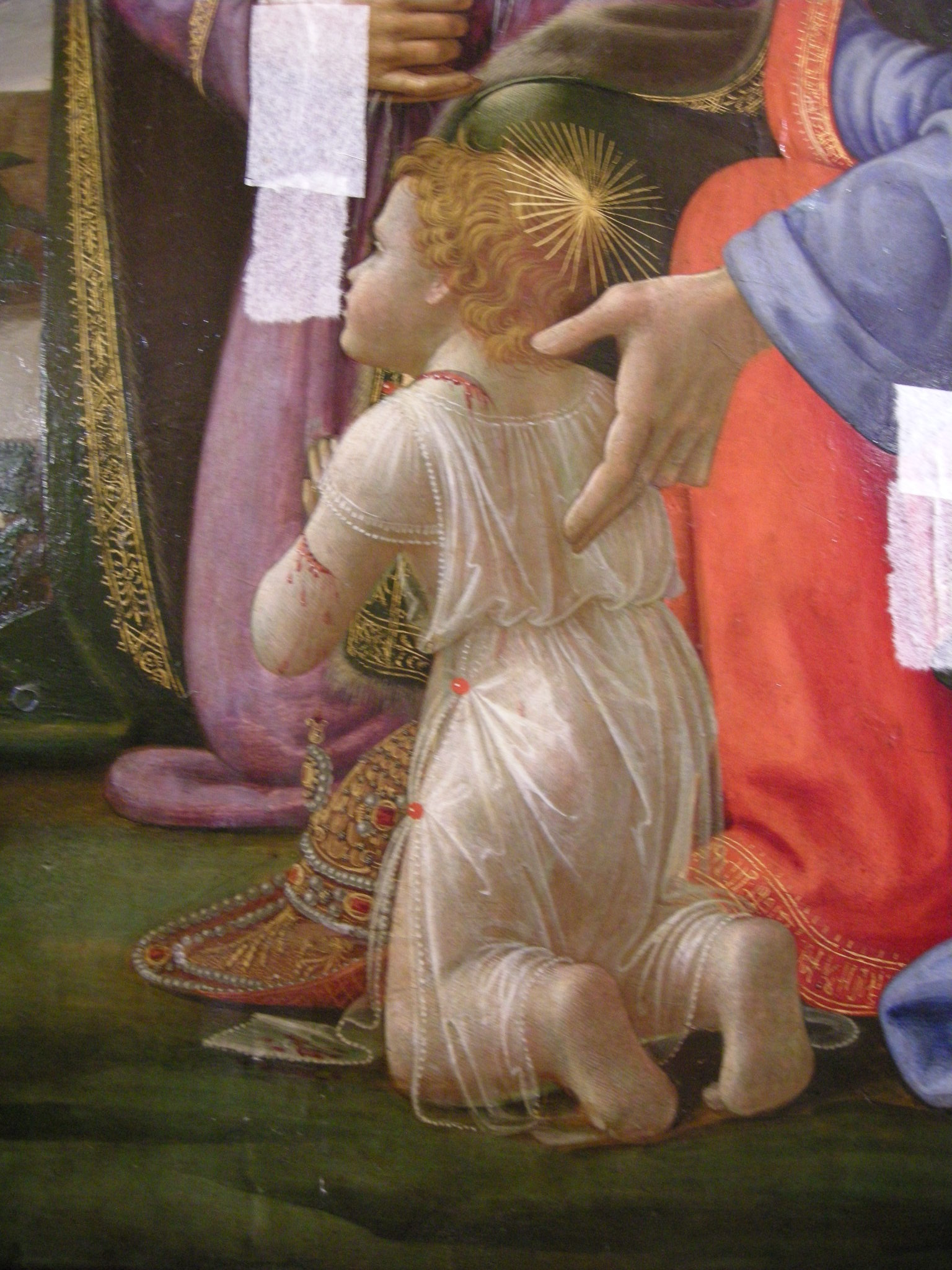 Adorazione dei magi di ghirlandaio, dettaglio